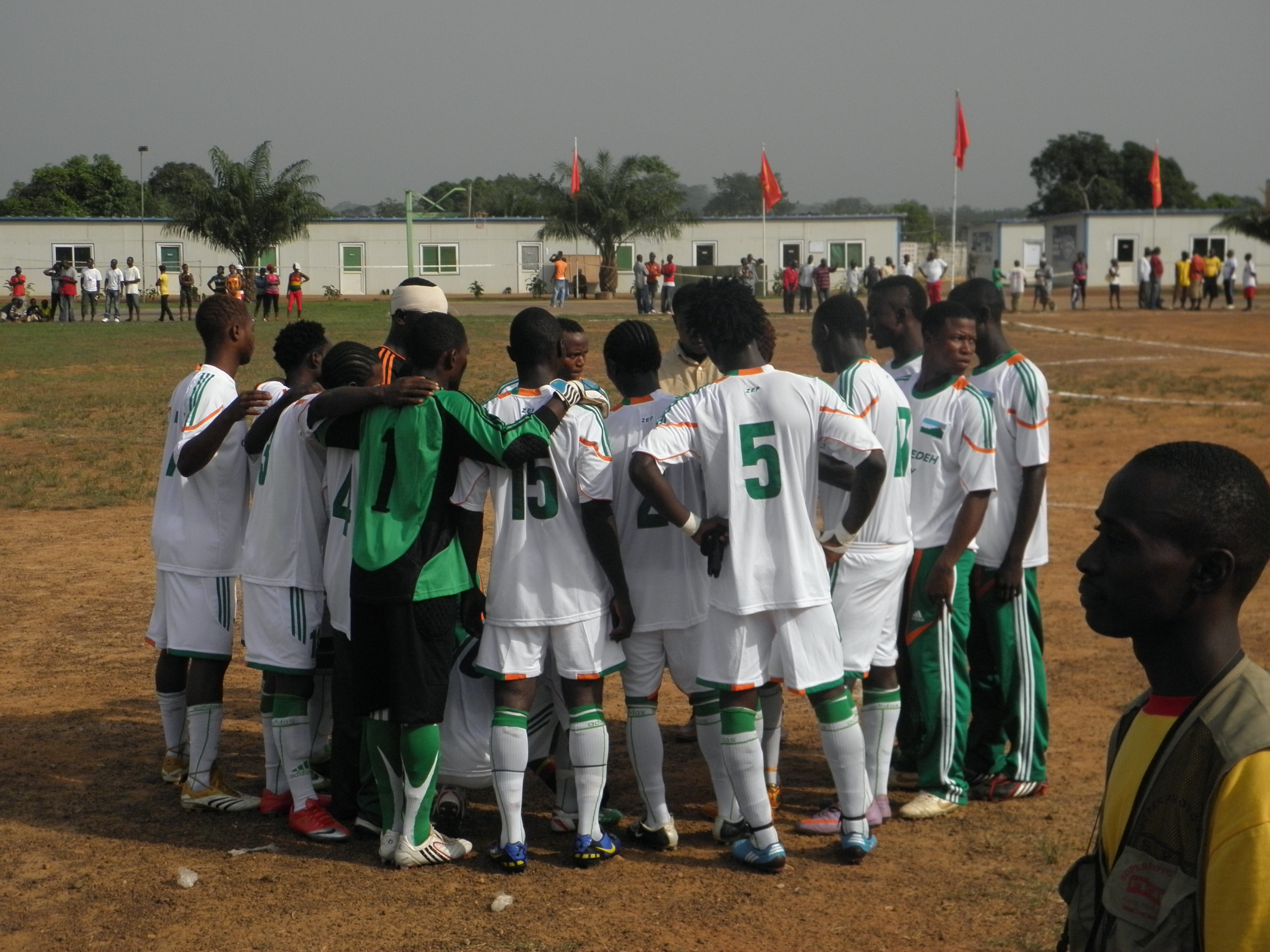 Zwedru, Liberia